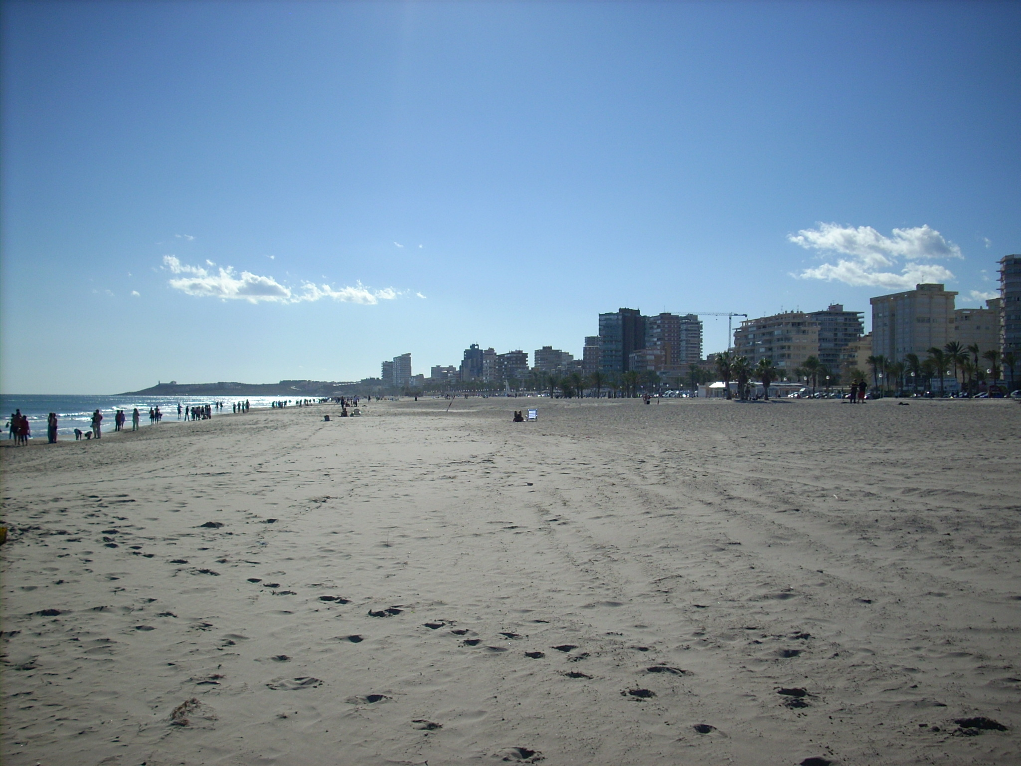 Playa de San Juan. Alicante (España).